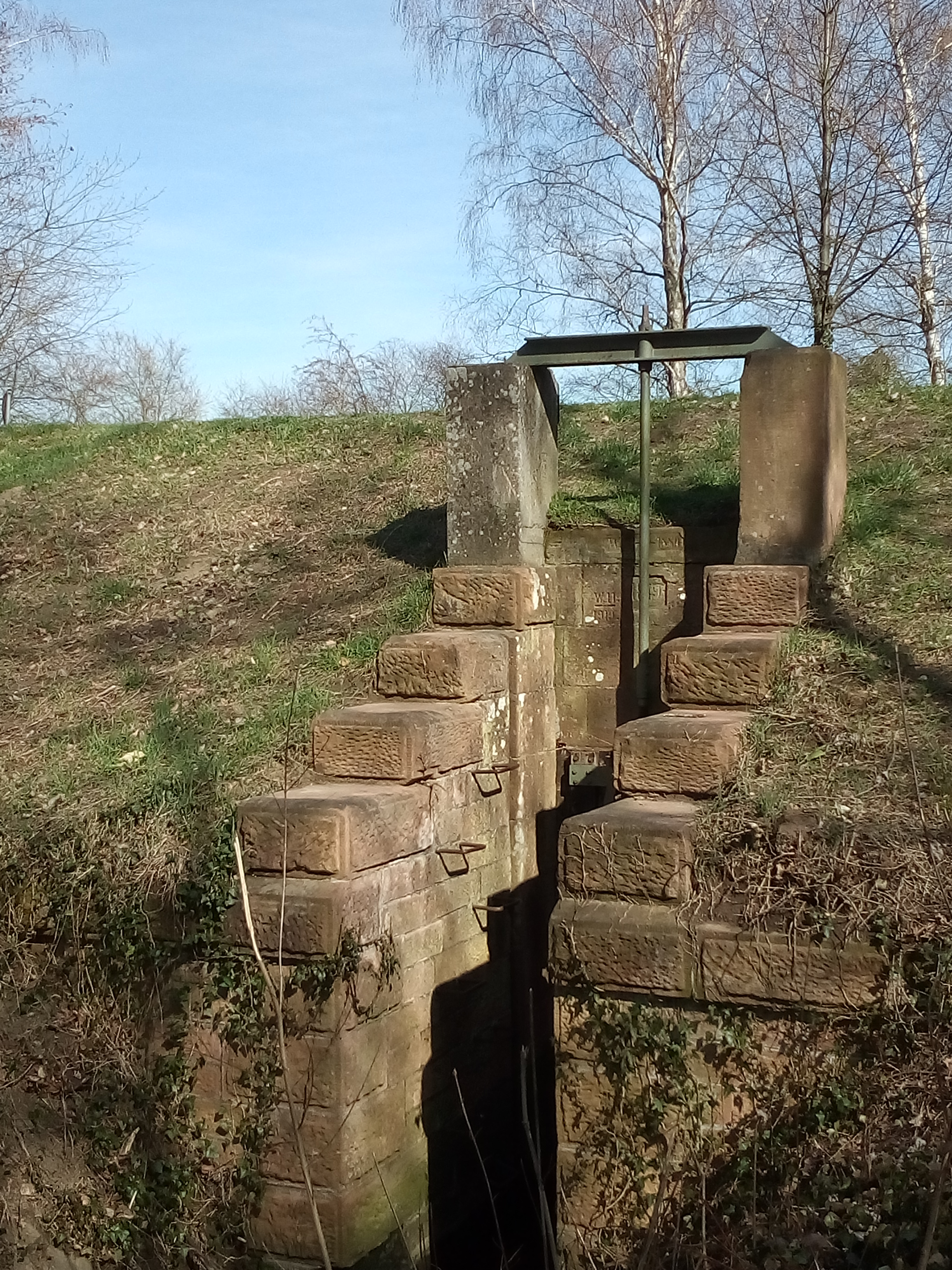 Schließe des Bruchgrabens (auch Gottesacker genannt) am Rheinniederungskanal bei Philippsburg